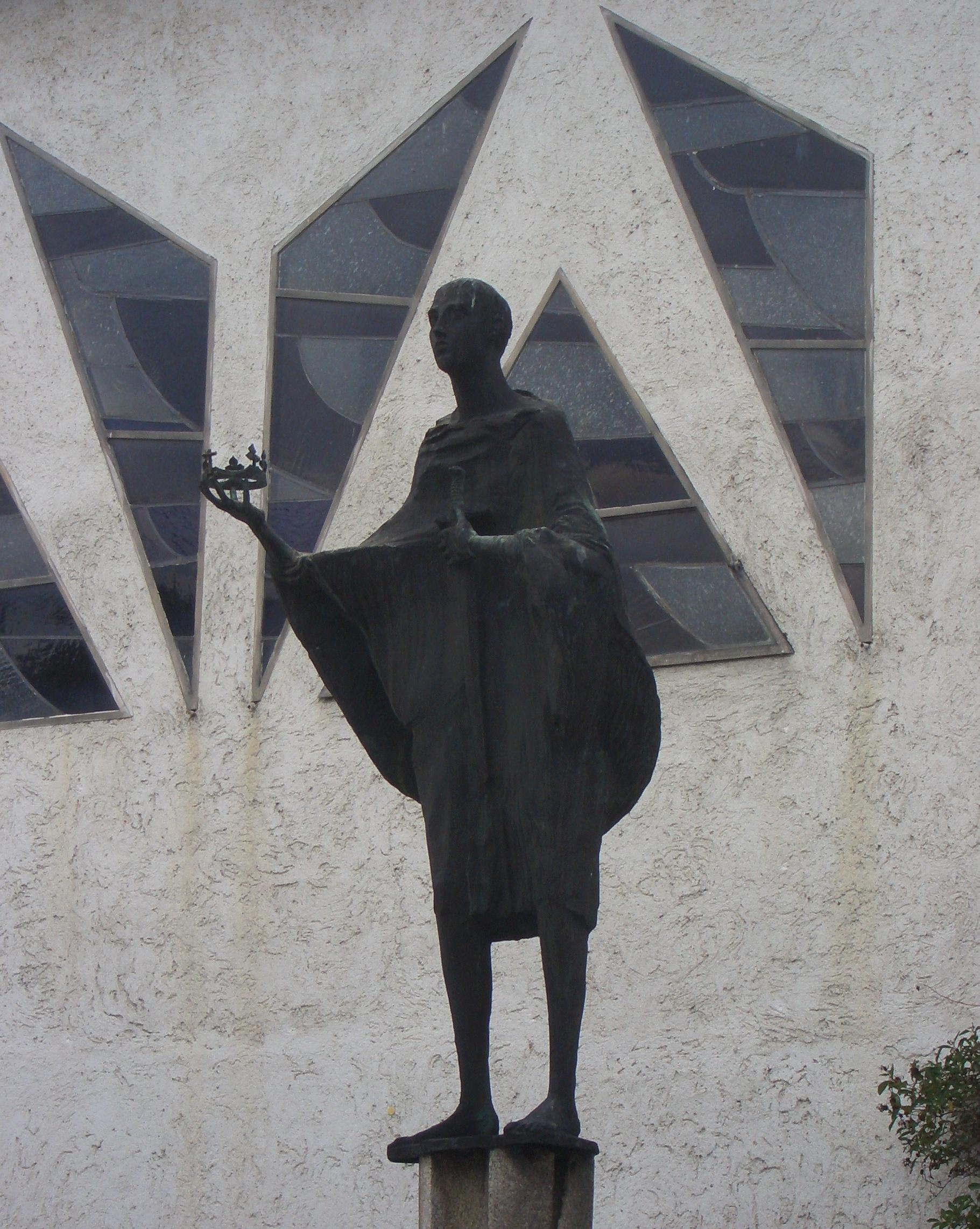 Bronzestatue des St. Pankratius am Kirchplatz in Roding/Oberpfalz